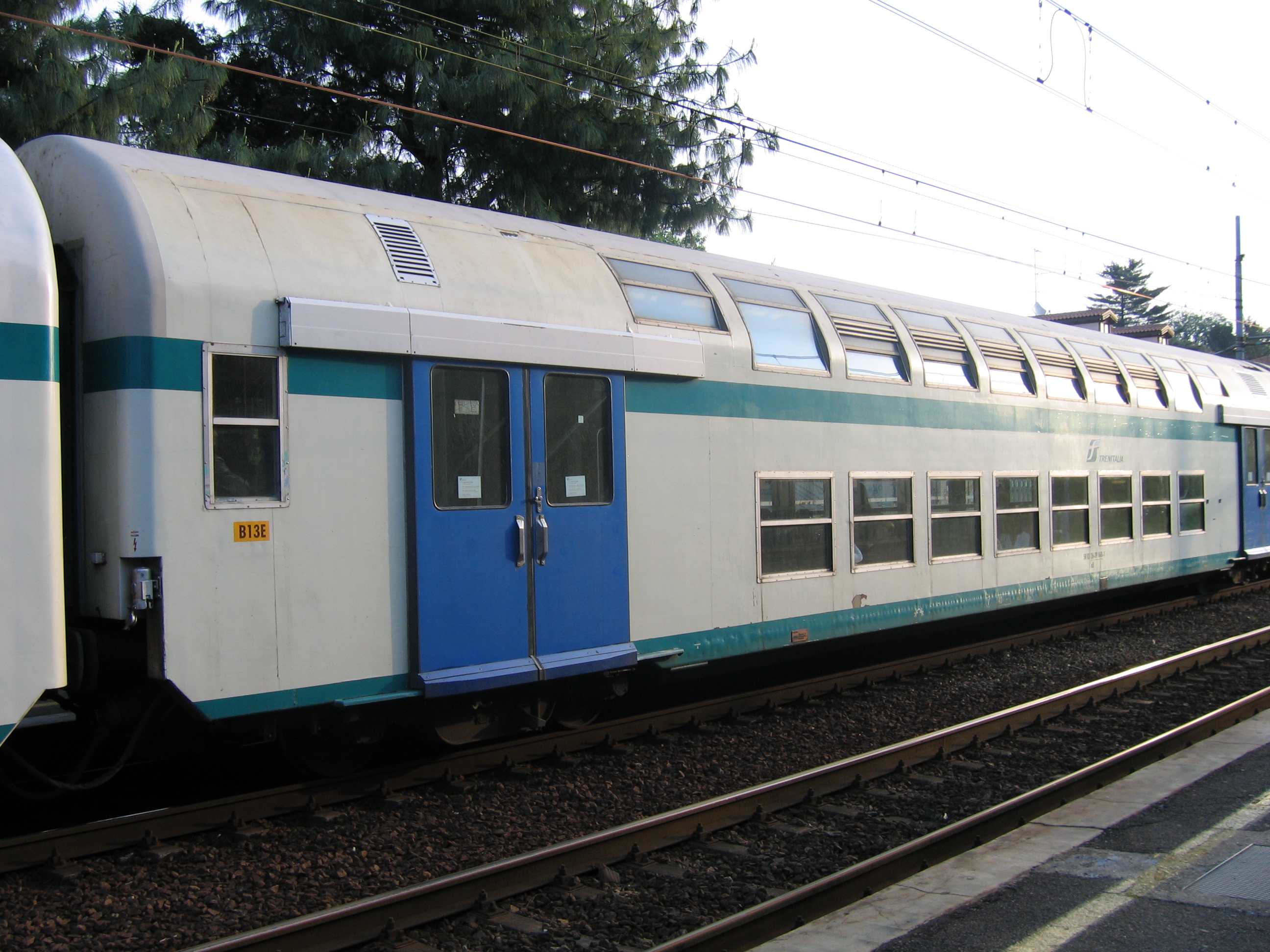 Carrozza a due piani tipo Casaralta delle Ferrovie dello Stato, in composizione a un treno suburbano della linea S6 in sosta a Magenta